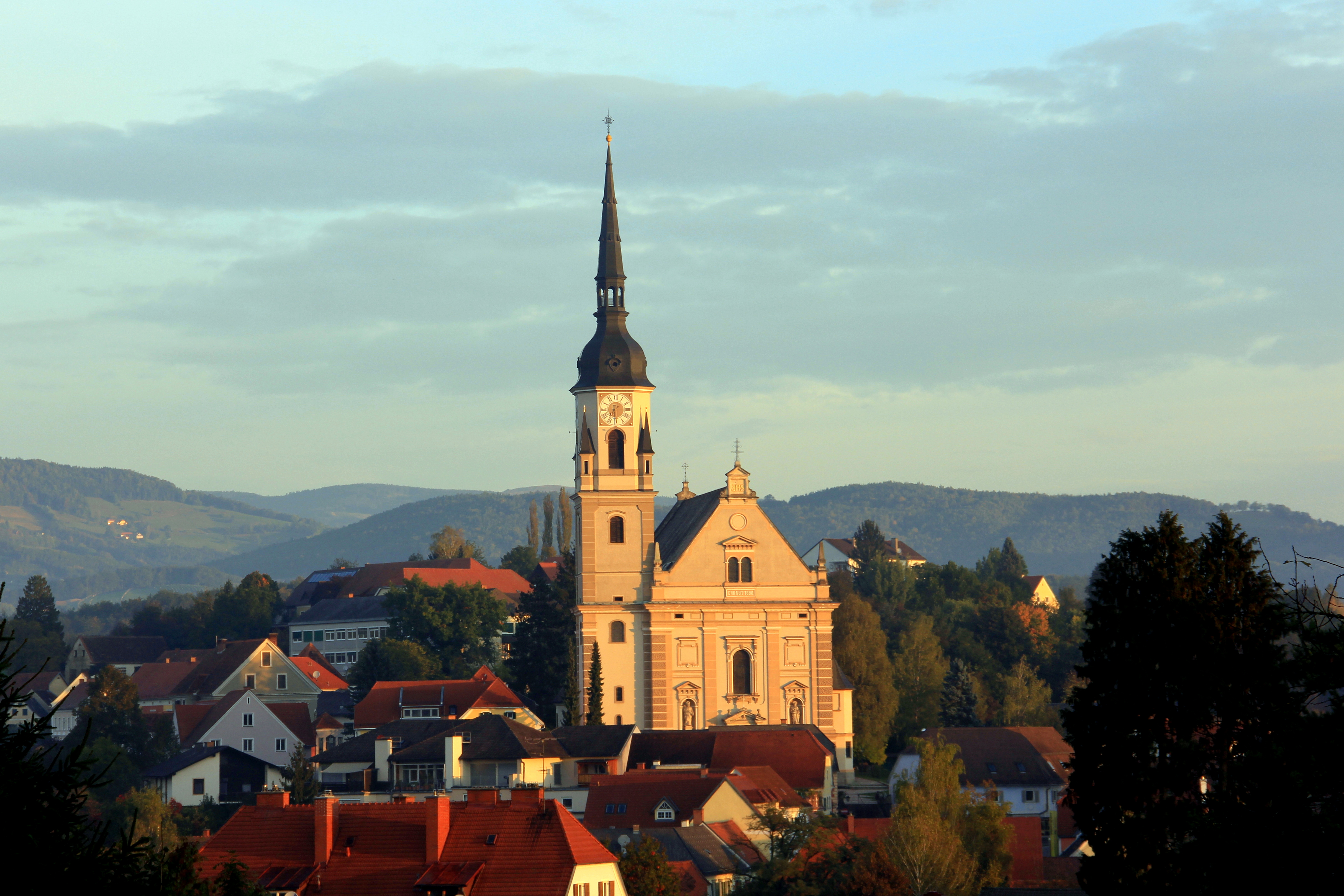 Kath. Pfarrkirche hll. Peter und Paul